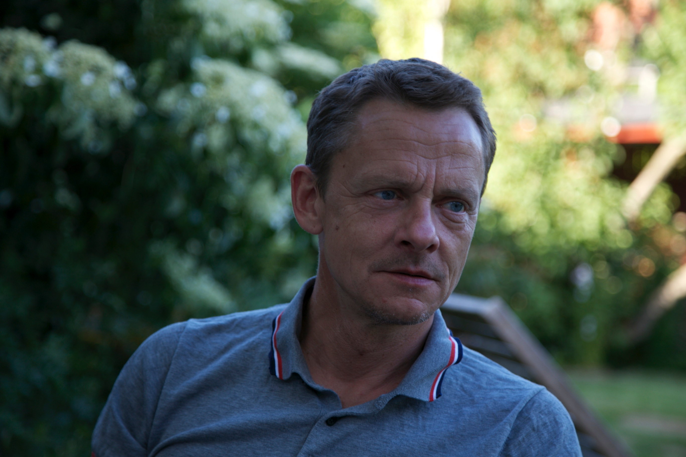 Olaf Johannessen 2014